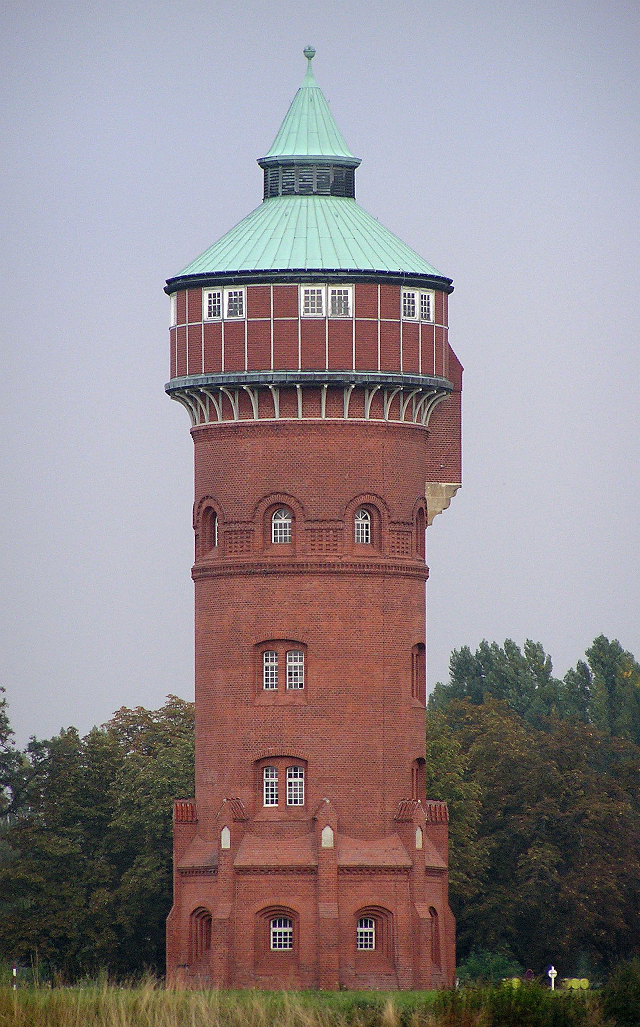 Wasserturm Gaswerk Mariendorf I (Berlin)